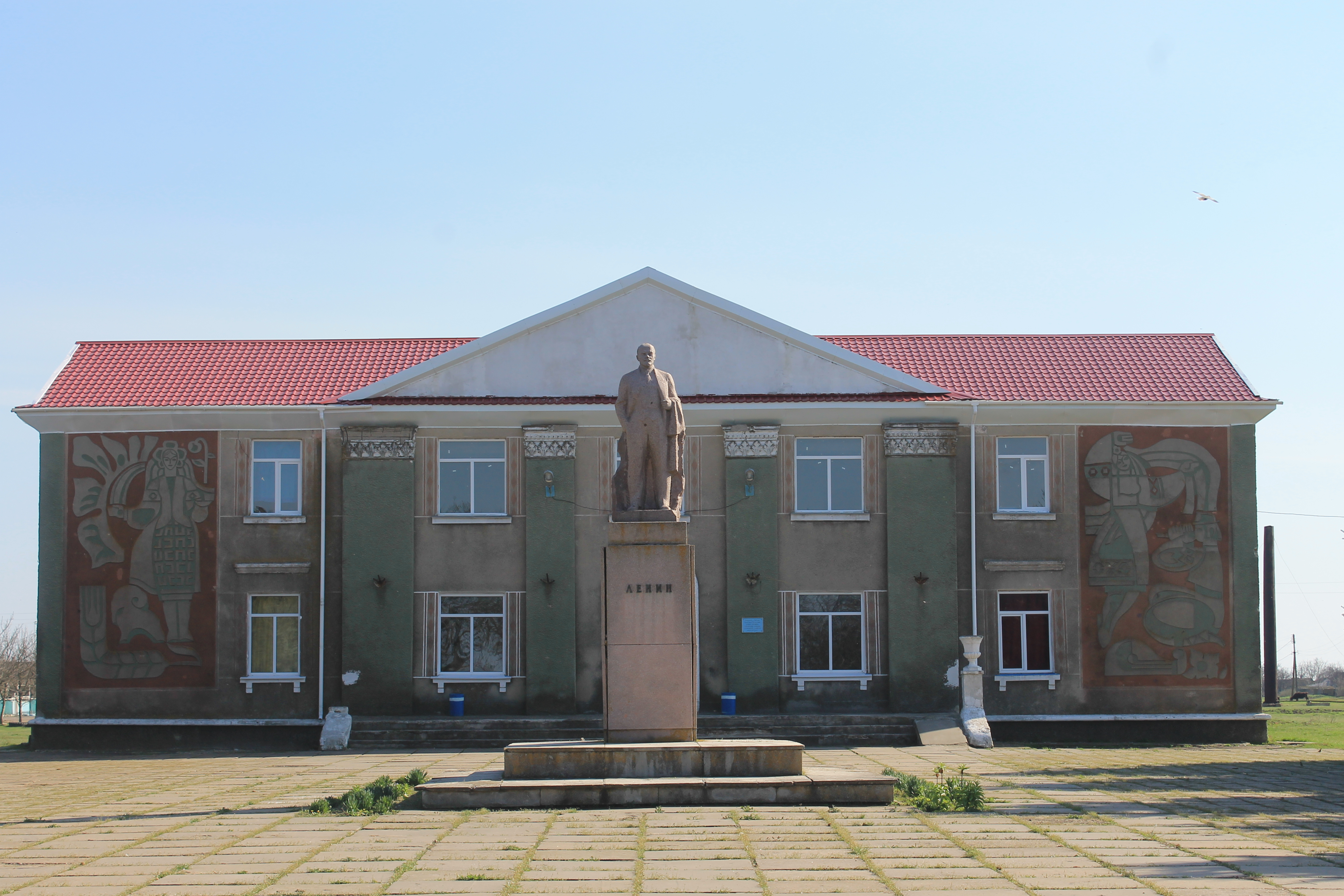 Клуб села Владимиро-Ильинка (ныне Чумацкий Шлях)